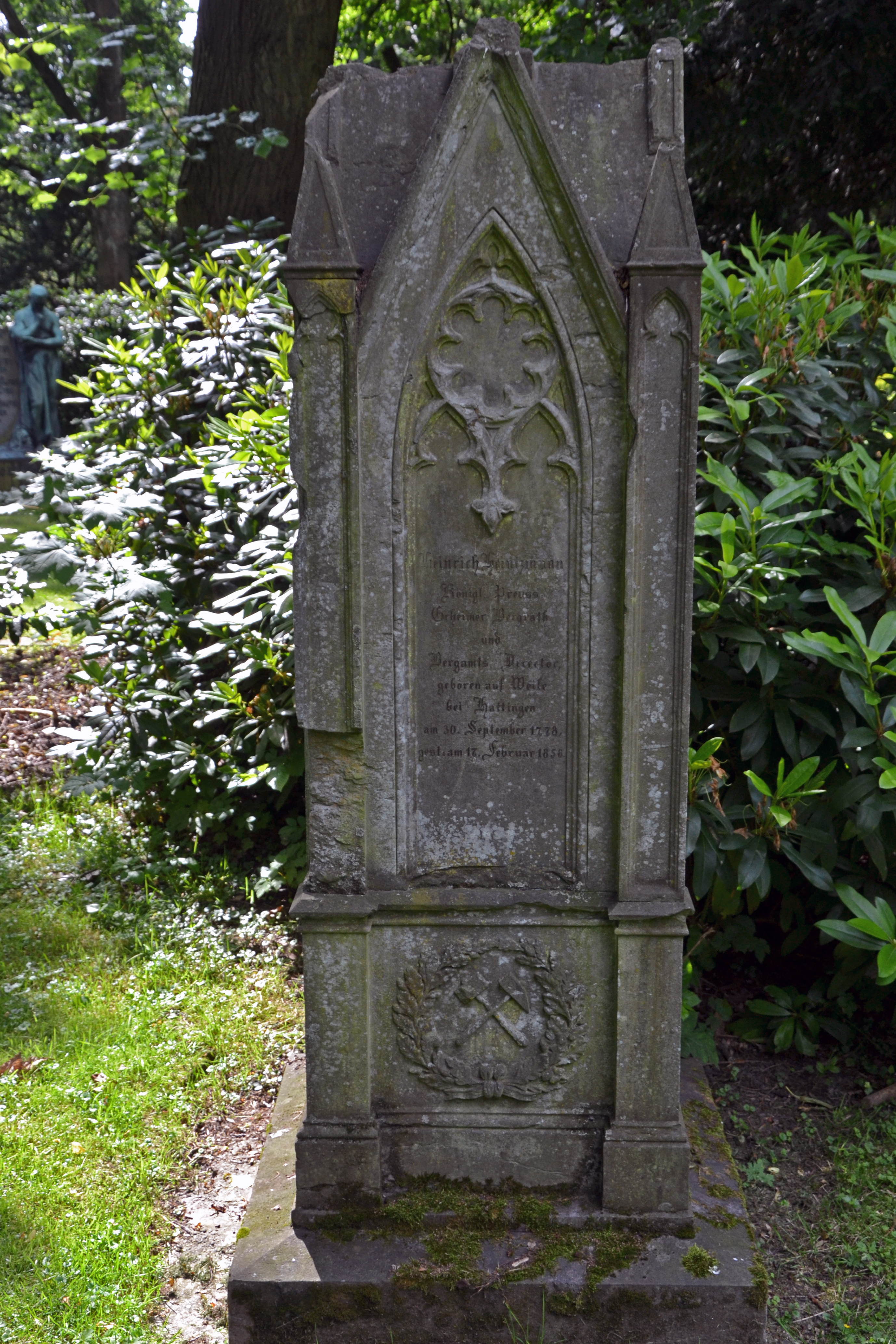 Grabmal auf dem historischen Gräberfeld des Essener Ostfriedhofs, in den 1950er Jahren vom geschlossenen Friedhof am Kettwiger überführt